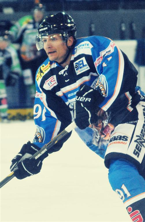 Rene Röthke